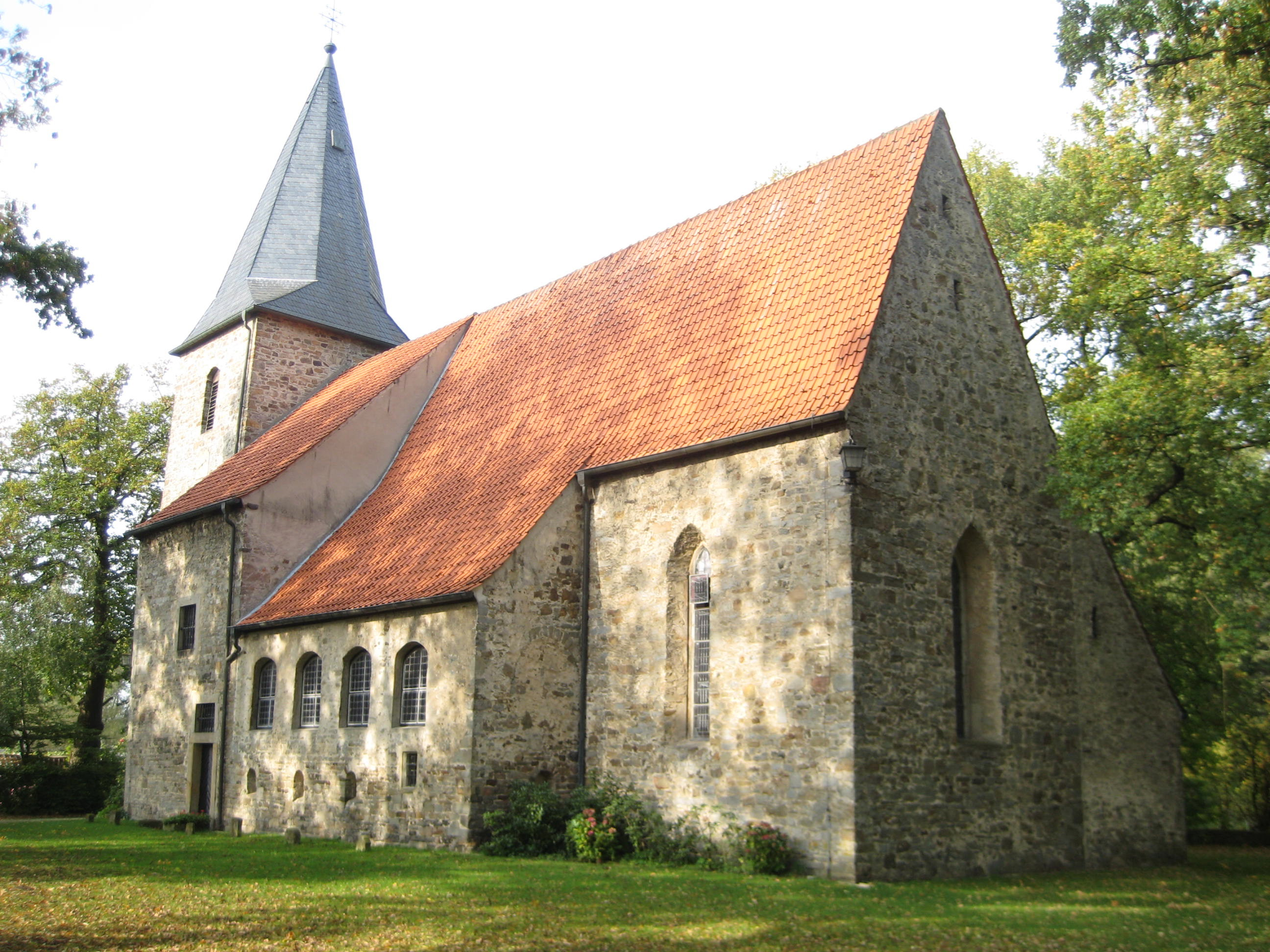 Alte St. Alexanderkirche in Wallenhorst